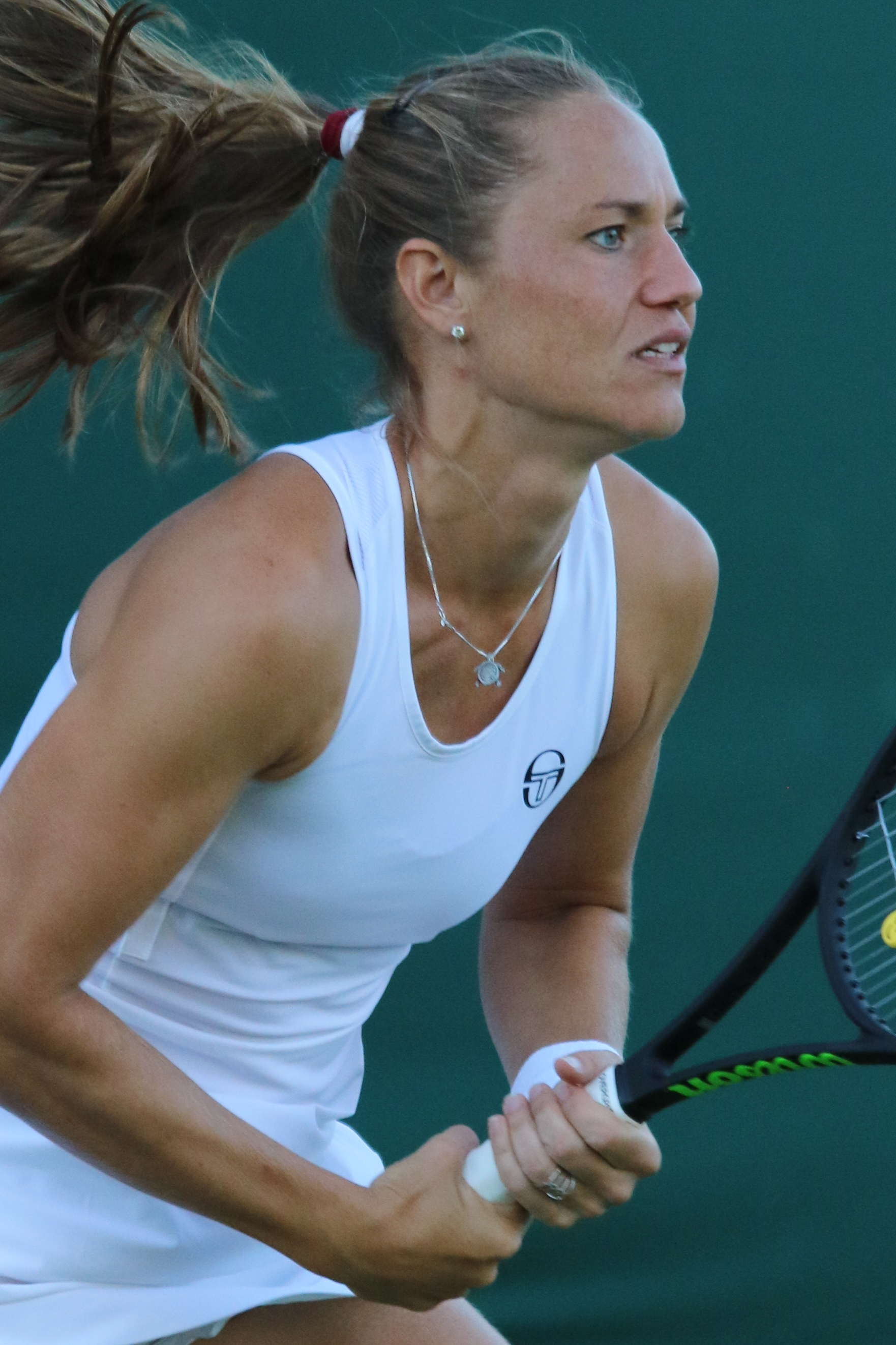 Bondarenko WM18 (8)